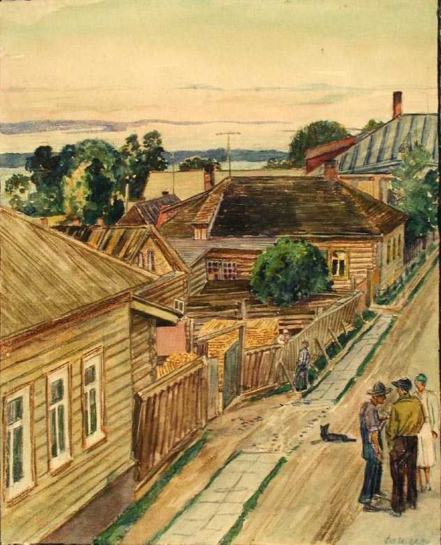 Фогелер Г. Улица в Петрозаводске. 1933 -1934 гг.